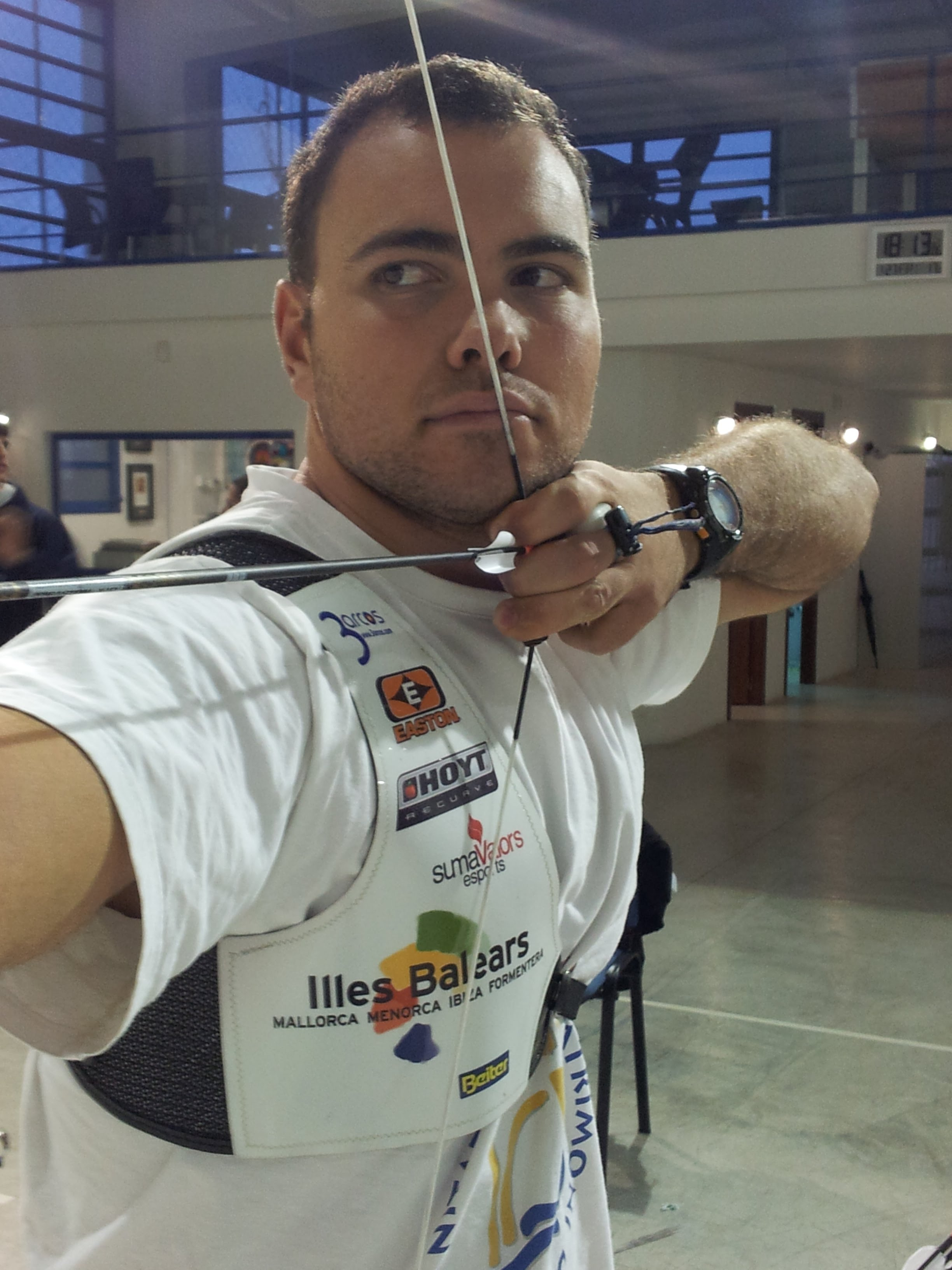 Daniel Morillo tirando en la galeria Victor Juan (Eivissa)